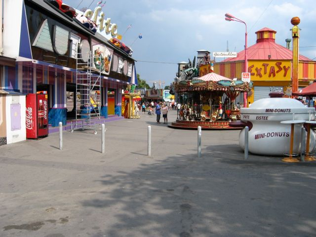 Wurstelprater in Wien